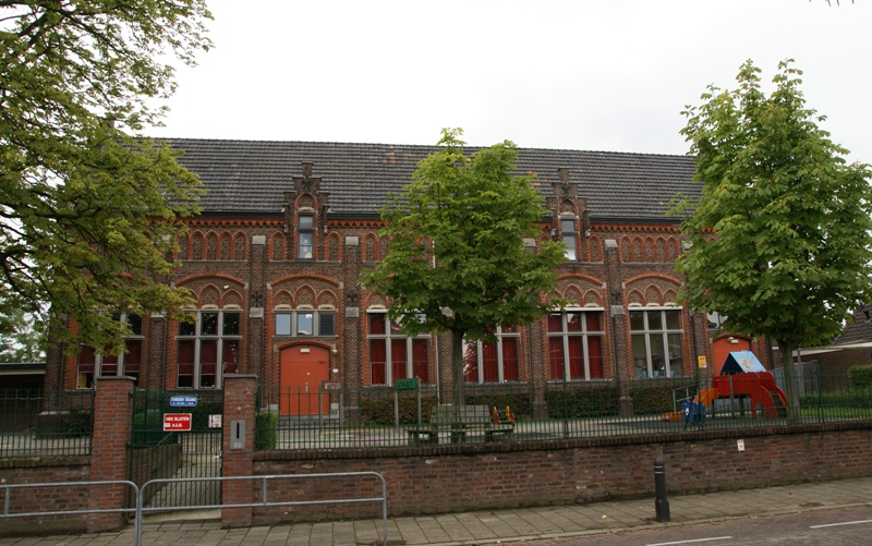 Rijksmonument 506614 - Ambyerstraat-Zuid 88, Maastricht. Voormalige lagere school, thans kinderdagverblijf Kastanjehof.